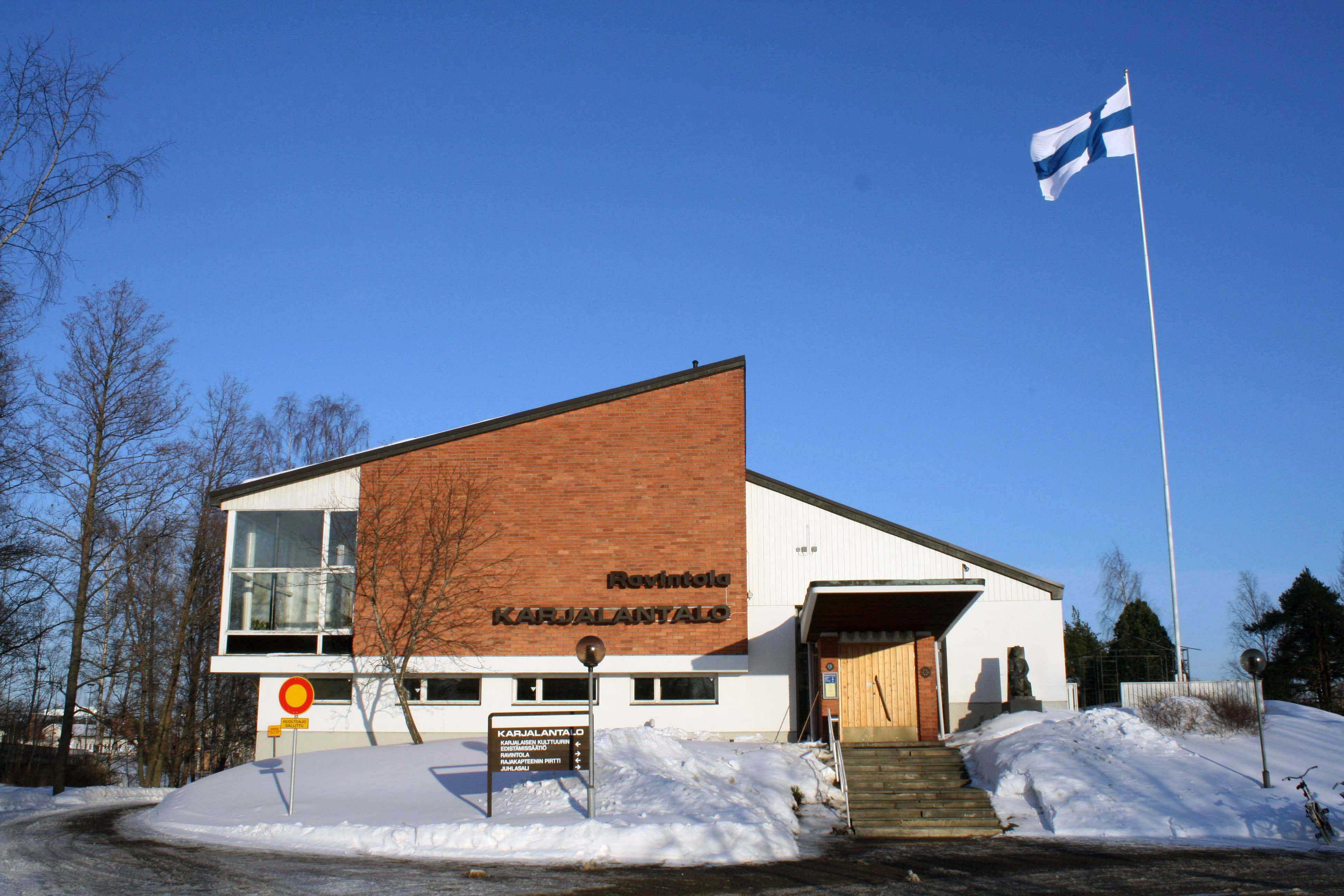 Karjalantalo Ilosaari Joensuu